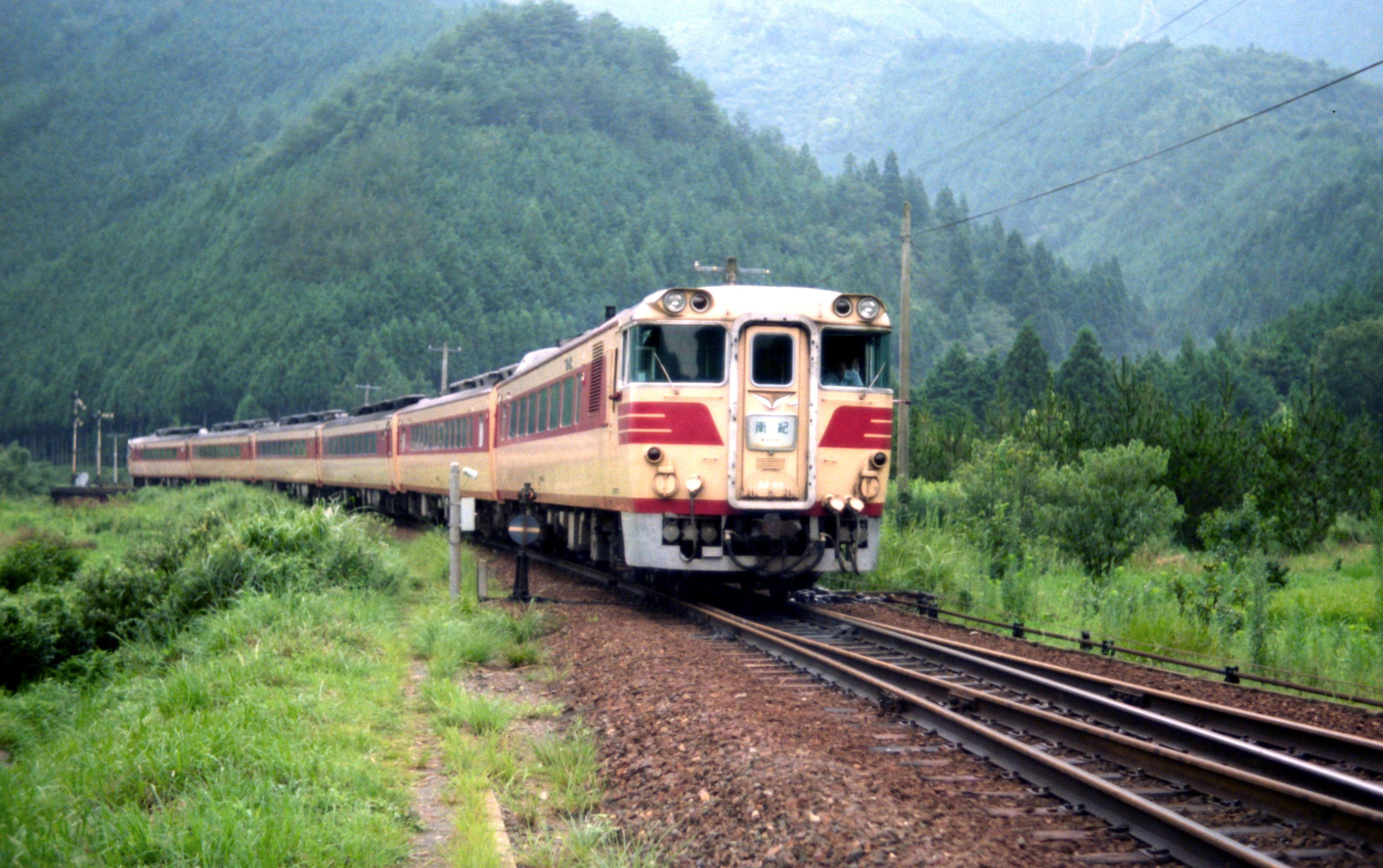 国鉄 キハ82系 特急南紀 大内山駅 Ｓ５５－８